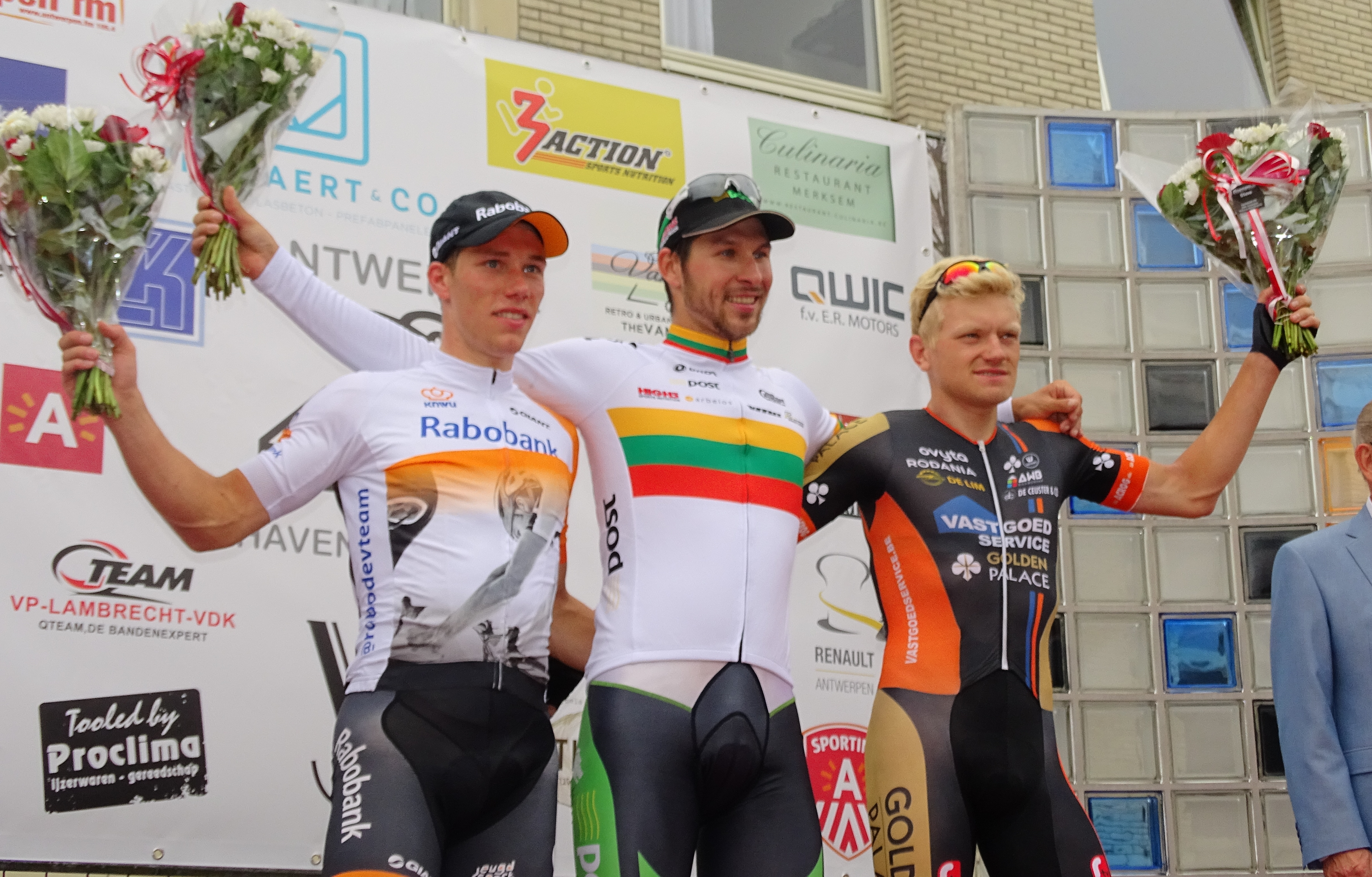 Reportage réalisé le dimanche 9 août à l'occasion de l'arrivée de la Flèche du port d'Anvers 2015 à Merksem (Anvers), Belgique.